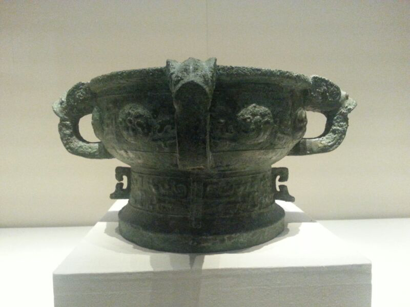 中文（中国大陆）: 西周宜侯夨簋